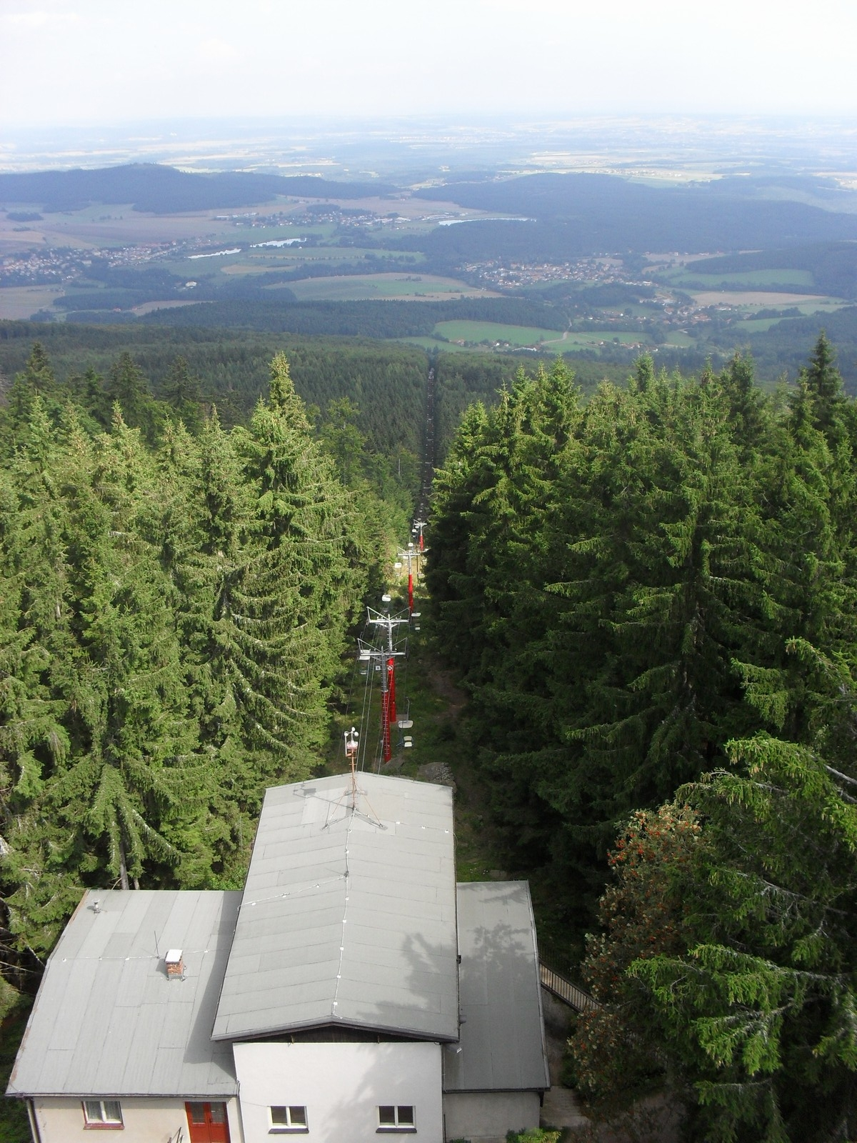 Fotky z mého výletu na Šumavskou Kleť